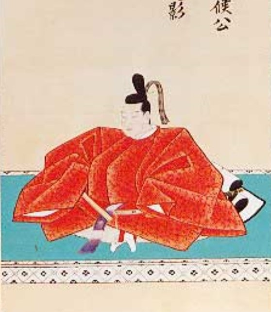 溝口直侯の肖像。